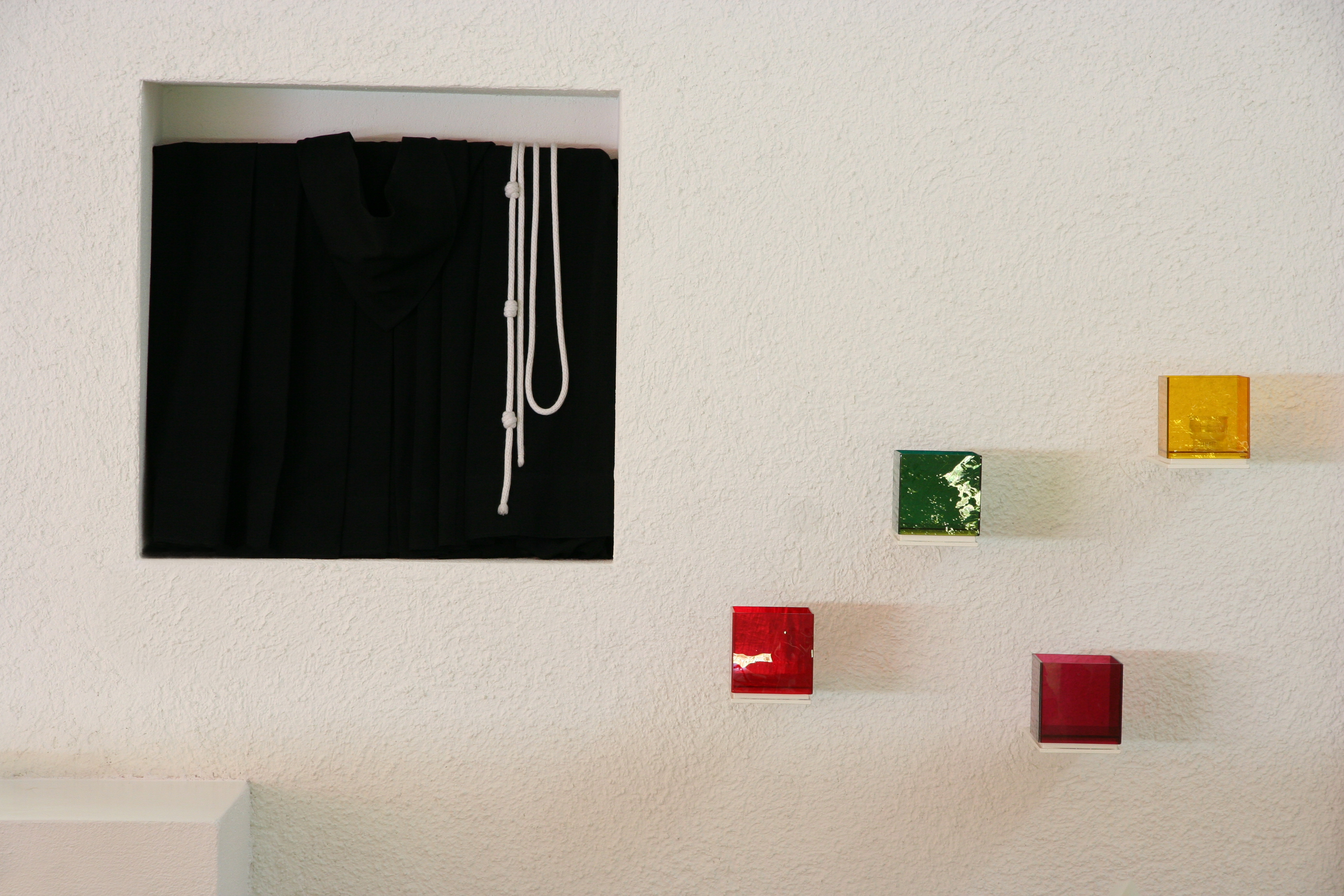 Römisch-katholische Kirche St. Franziskus Uetikon am See